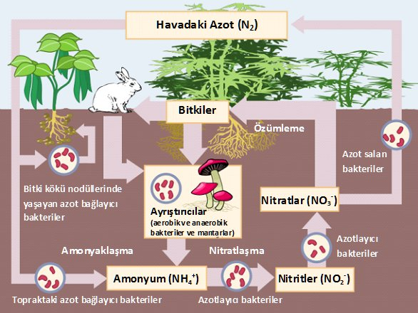 Nitrogen Cycle